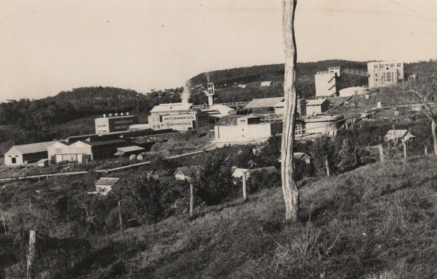 El pueblo de Puerto Piray, Misiones en el año 1960. Archivo de la familia Unternahrer.